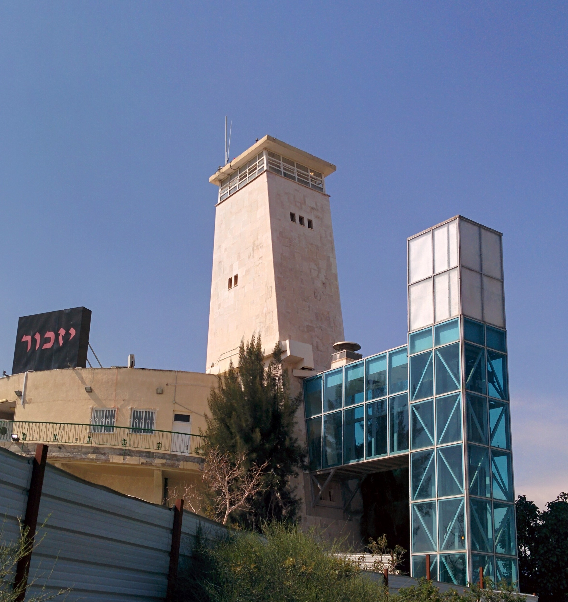 בית יד לבנים על הר הבנים, רמת גן